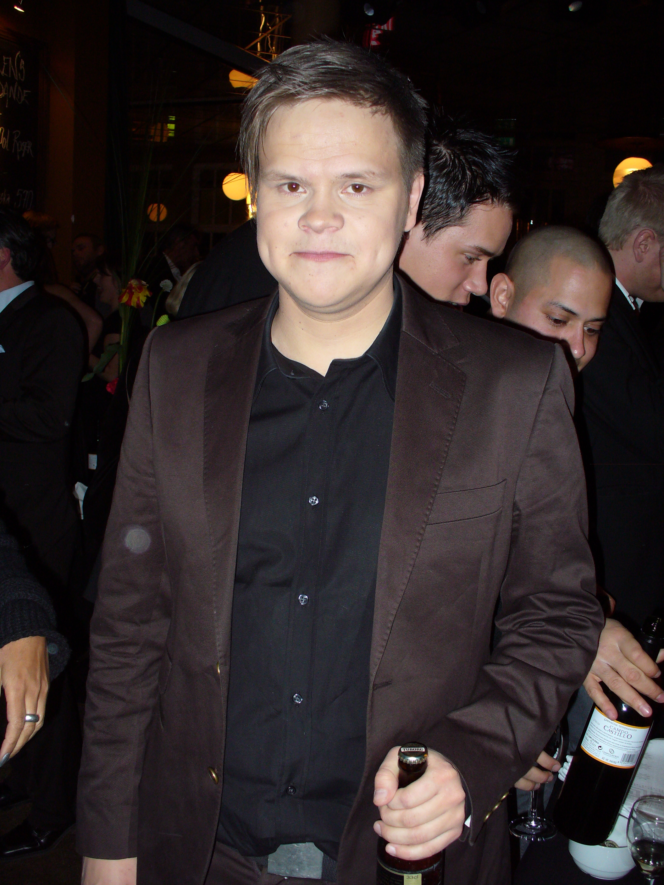 David Bexelius at Aftonbladet TV Awards.